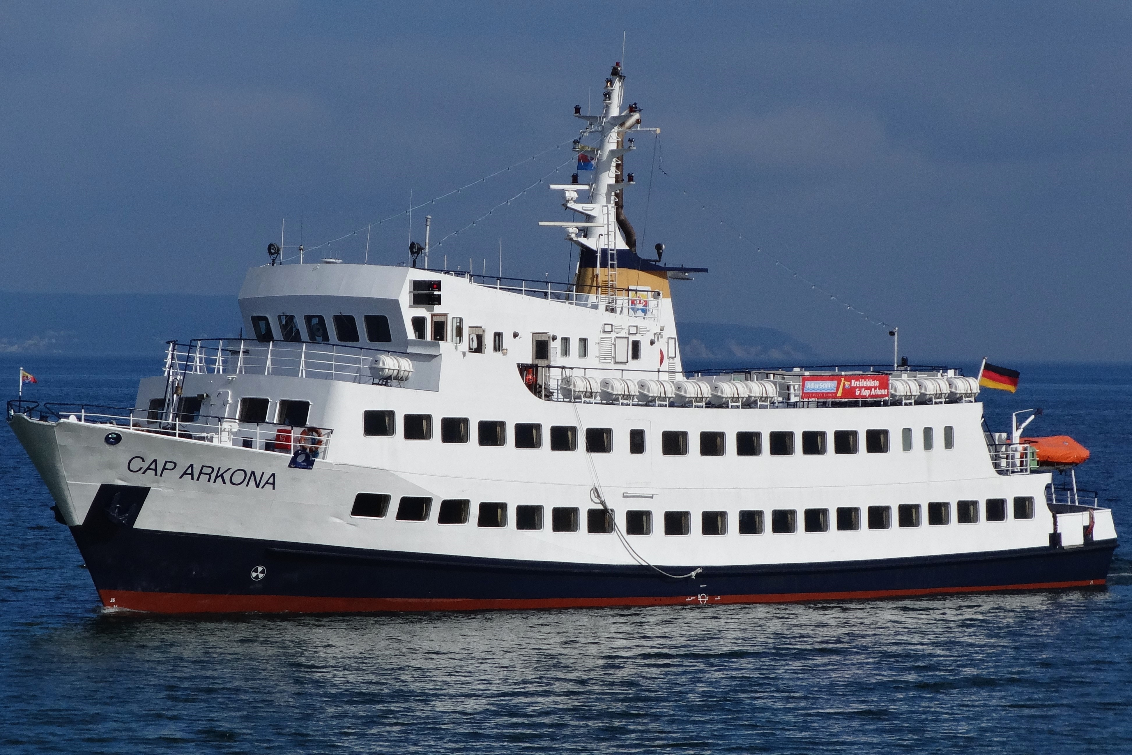 MS Cap Arkona am Morgen des 26.04.2015 bei der Ankunft an der Seebrücke von Sellin